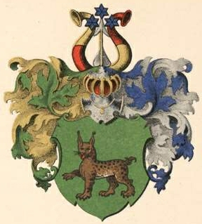 Bergholtzi suguvõsa aadlivapp